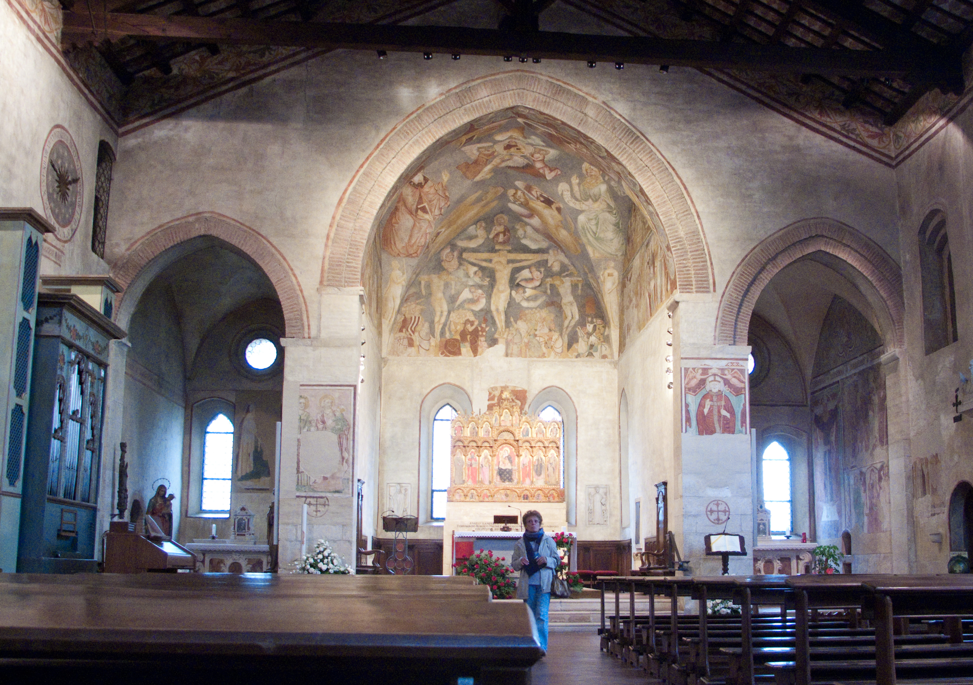 Chiesa di Sant'Agostino - Interno